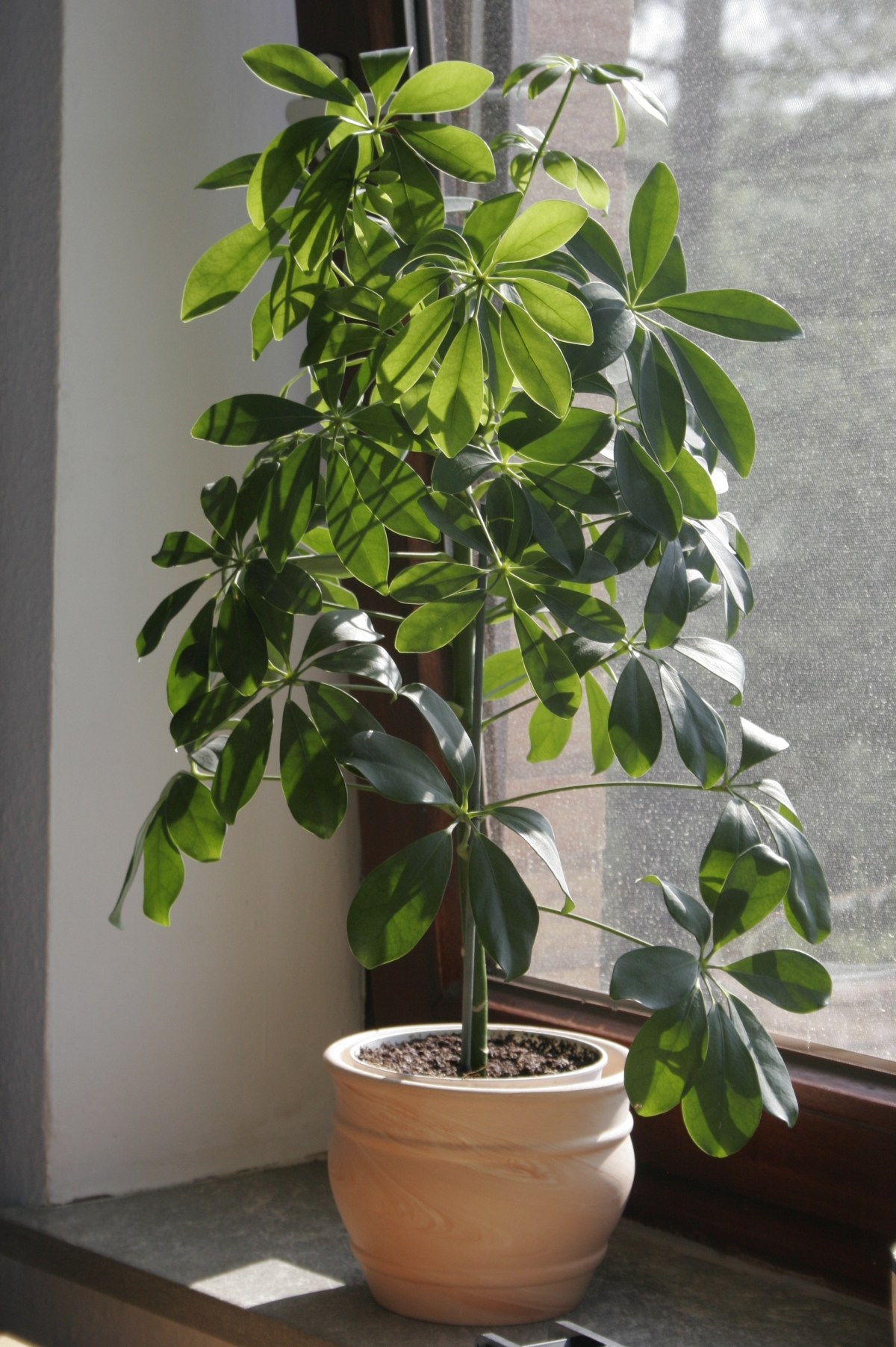 schefflera arboricola(umbrella tree)